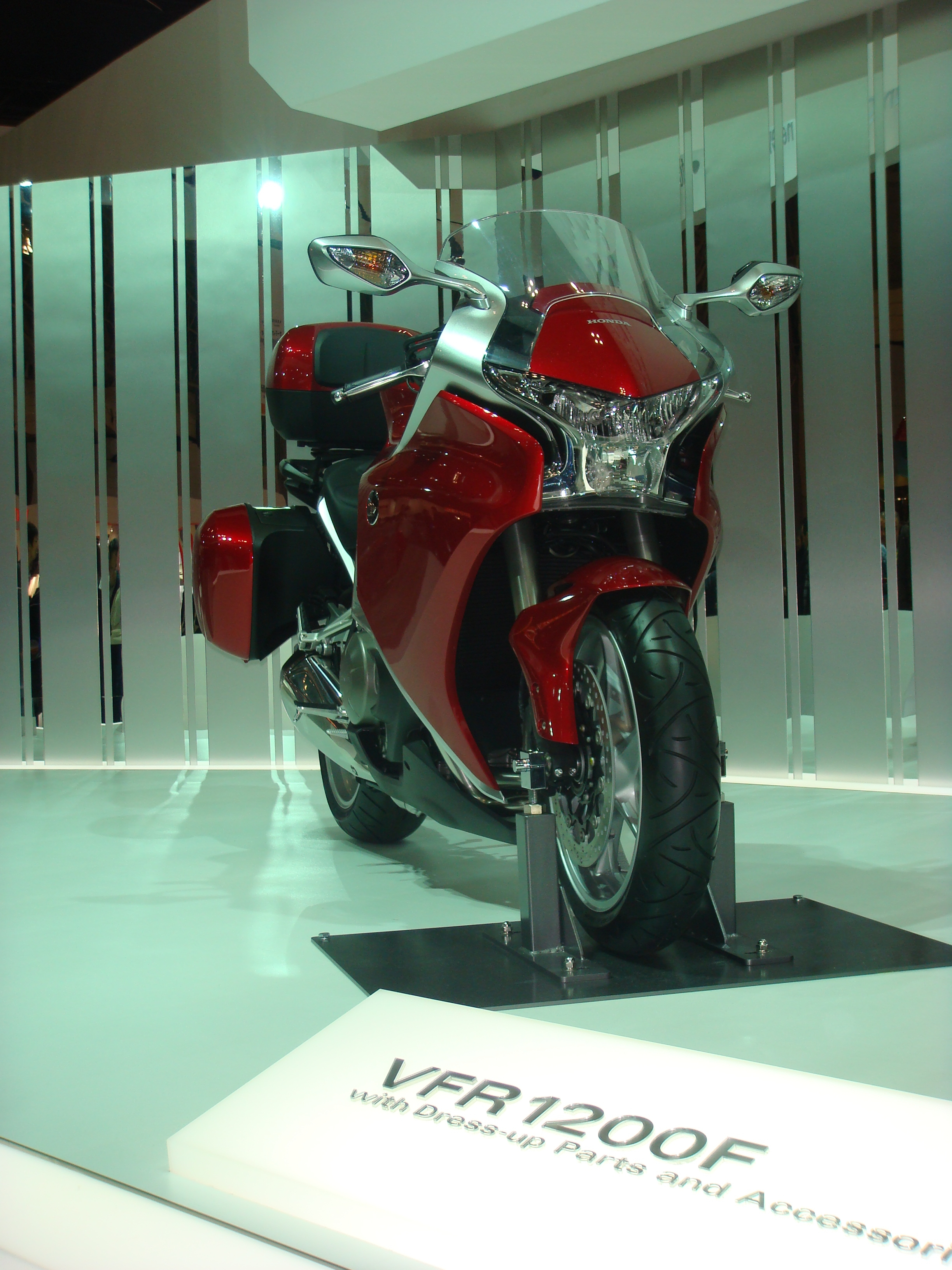 Honda VFR1200F